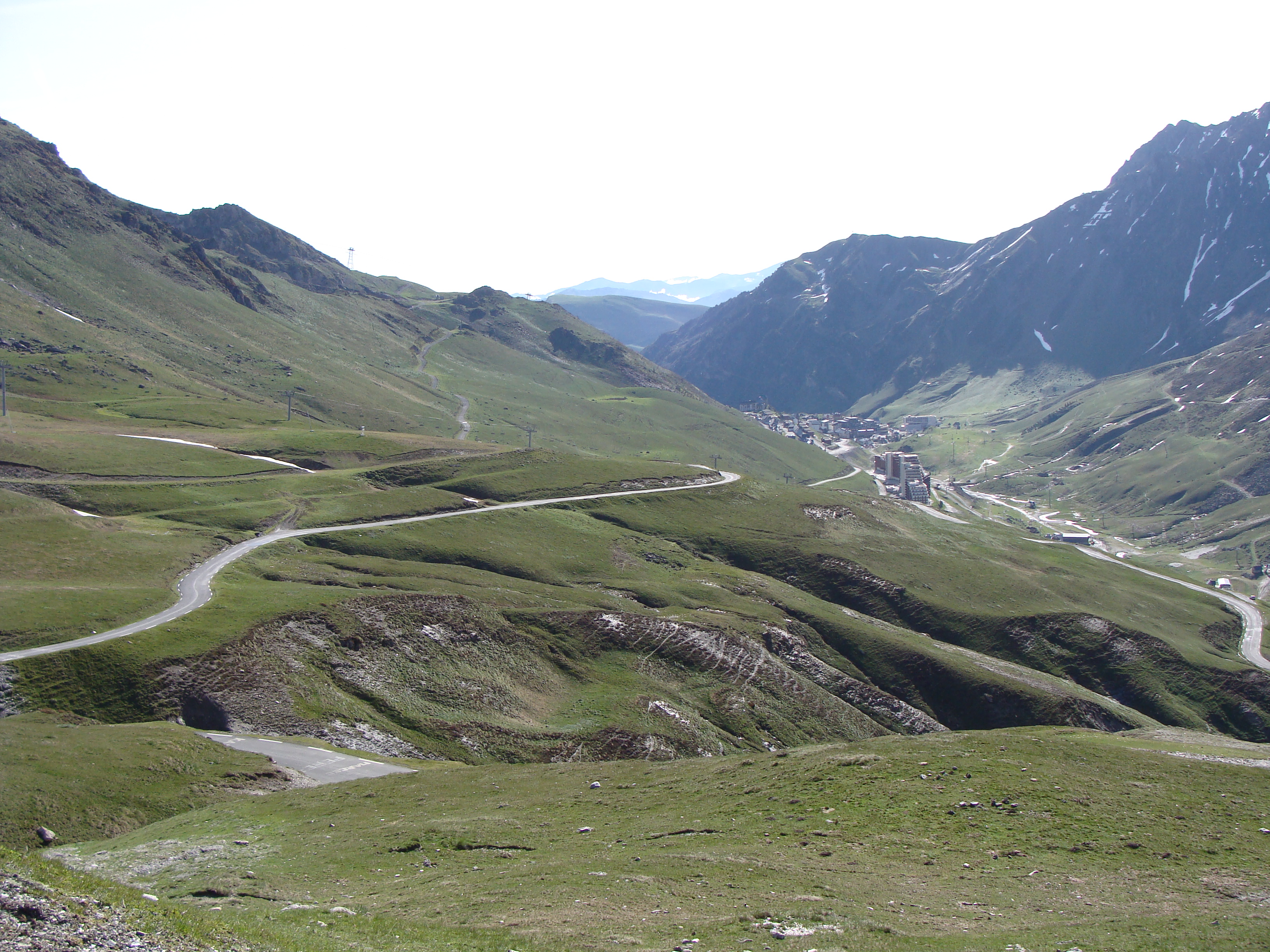 Col du Tourmalet - Vue sur La Mongie